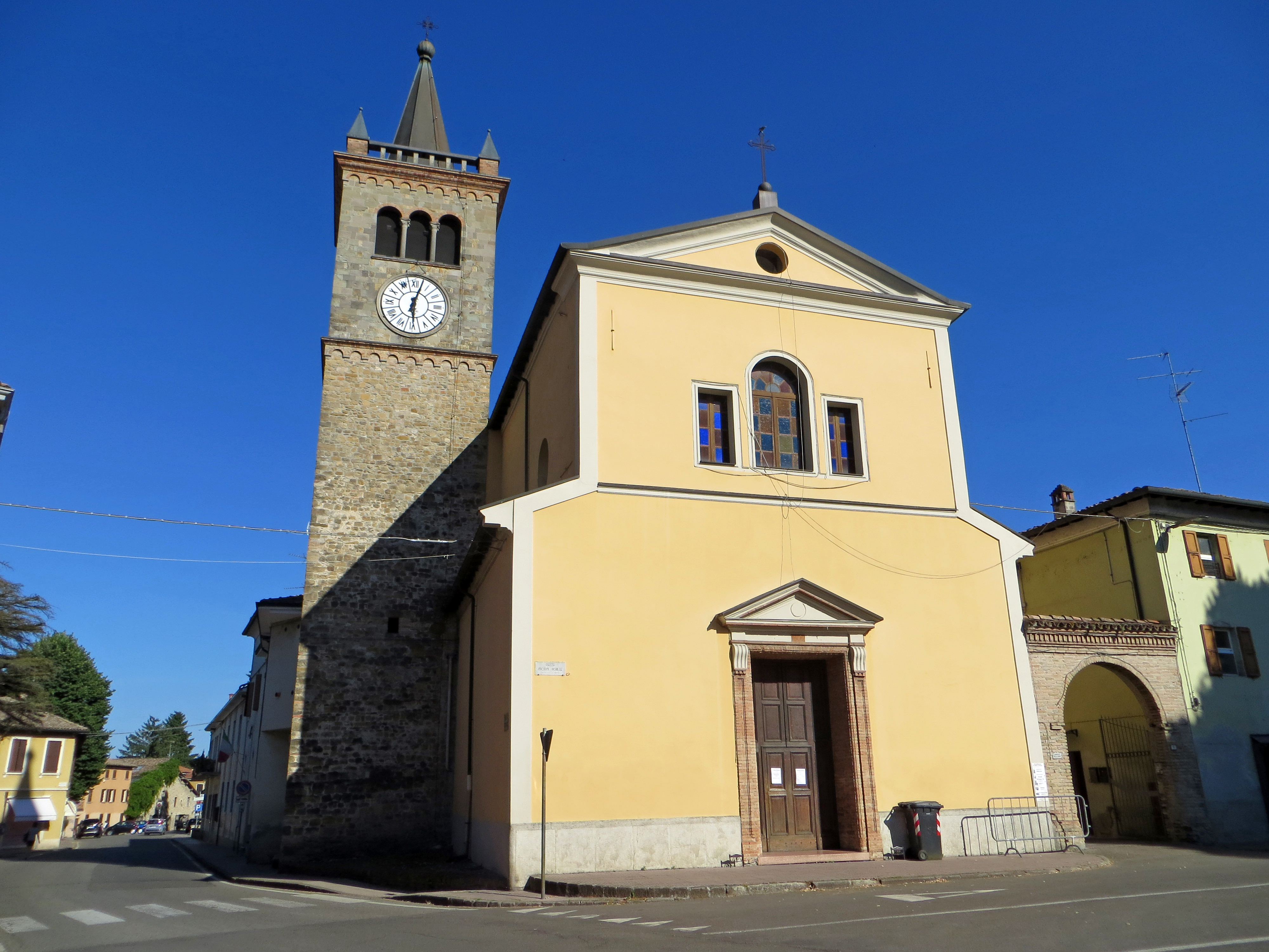 Chiesa della Purificazione della Beata Vergine Maria (Felino) - facciata e lato nord